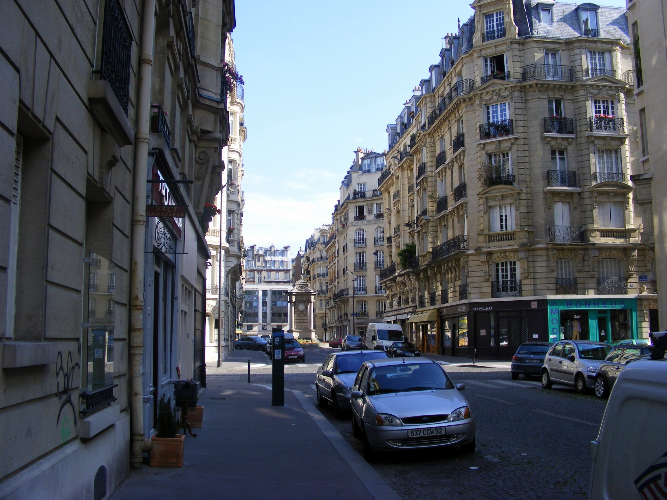 rue Bouchut, Paris